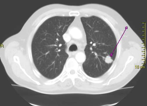 Beschreibung: Kleiner Lungentumor (T1) linker Oberlappen Quelle: selbst erstellt --Benutzer:Lange123 17:18, 11. Nov. 2004 (CEST)